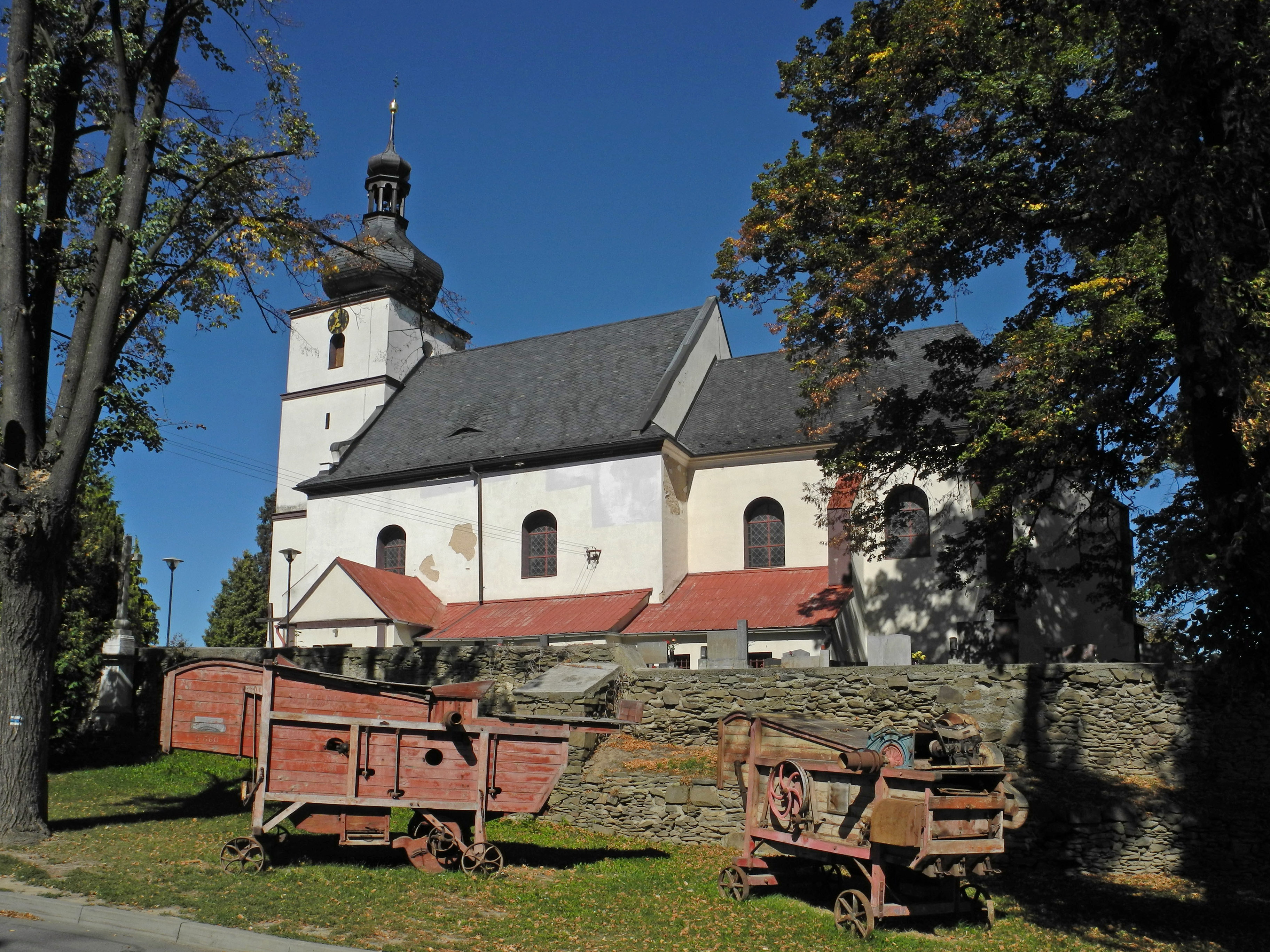 Nikolauskirche in Lobenstein (Úvalno)